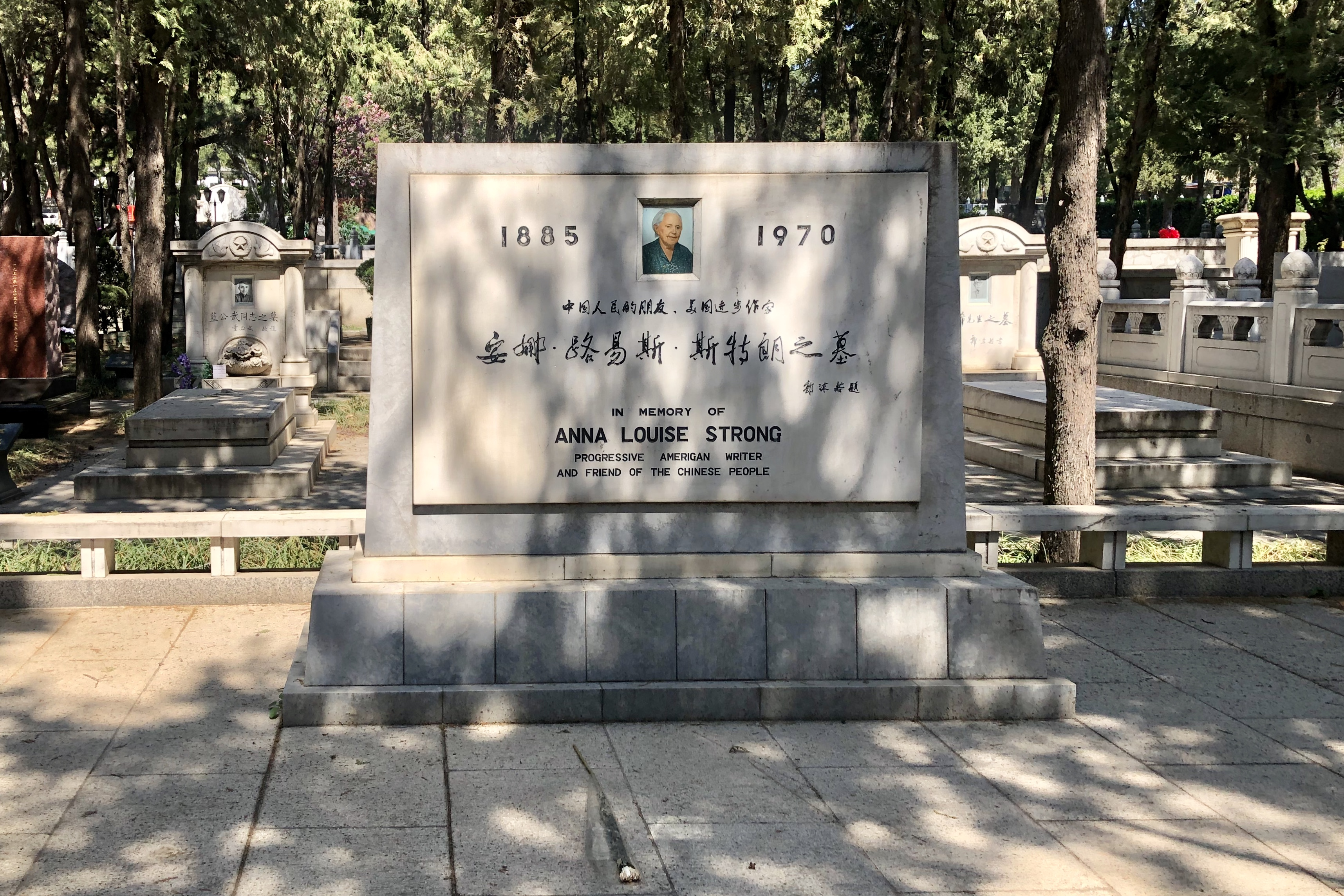 安娜·路易絲·斯特朗之墓，斯特朗为美国左派，亲共人士，一生致力于报道和宣传中国共产党，并与北京去世，死后葬于北京八宝山革命公墓。